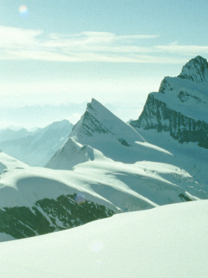 Agassishorn from Groß Fiescherhorn